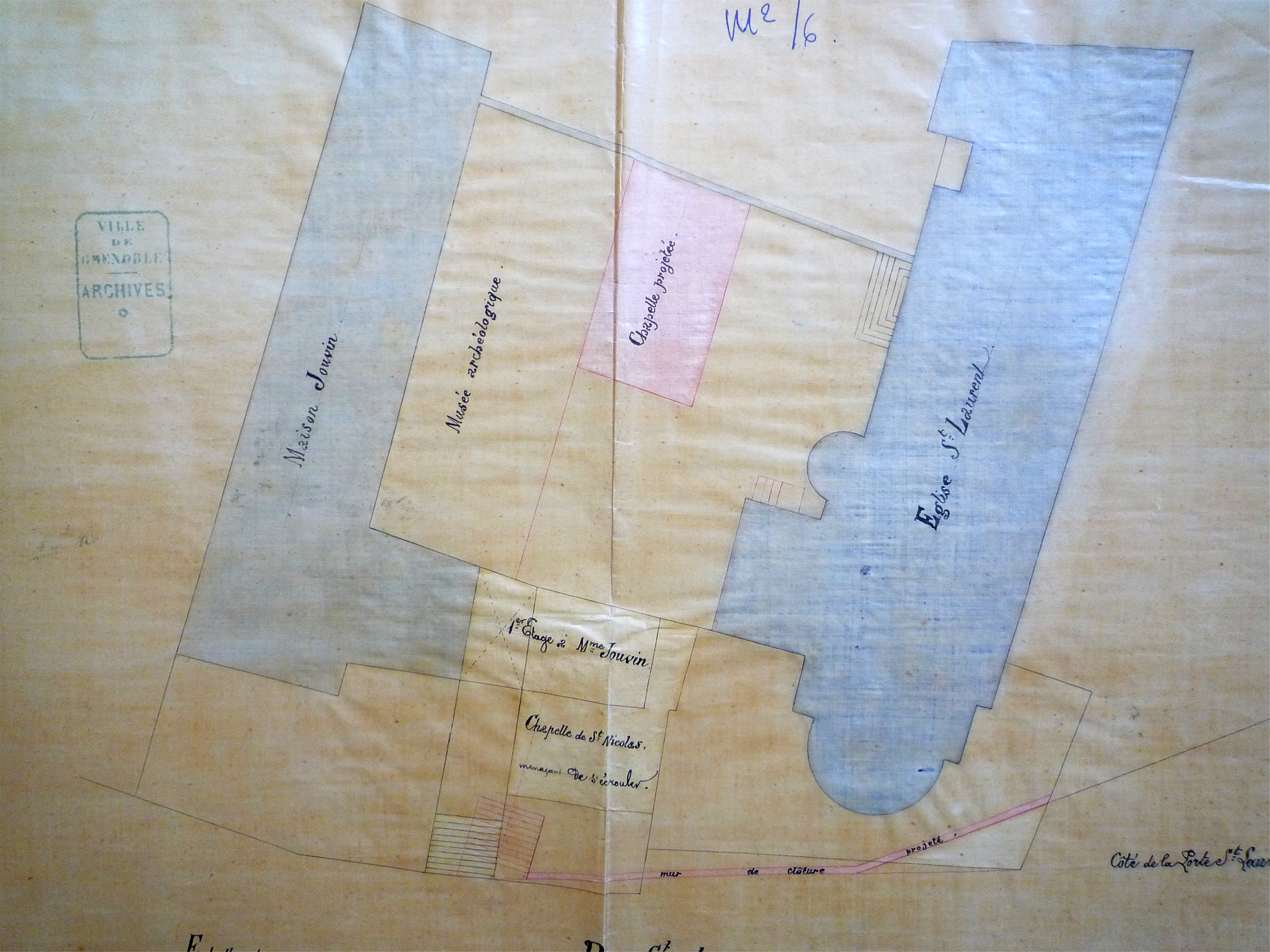 Plan du site du musée archéologique de Grenoble vers 1870 (église Saint-Laurent à l'époque